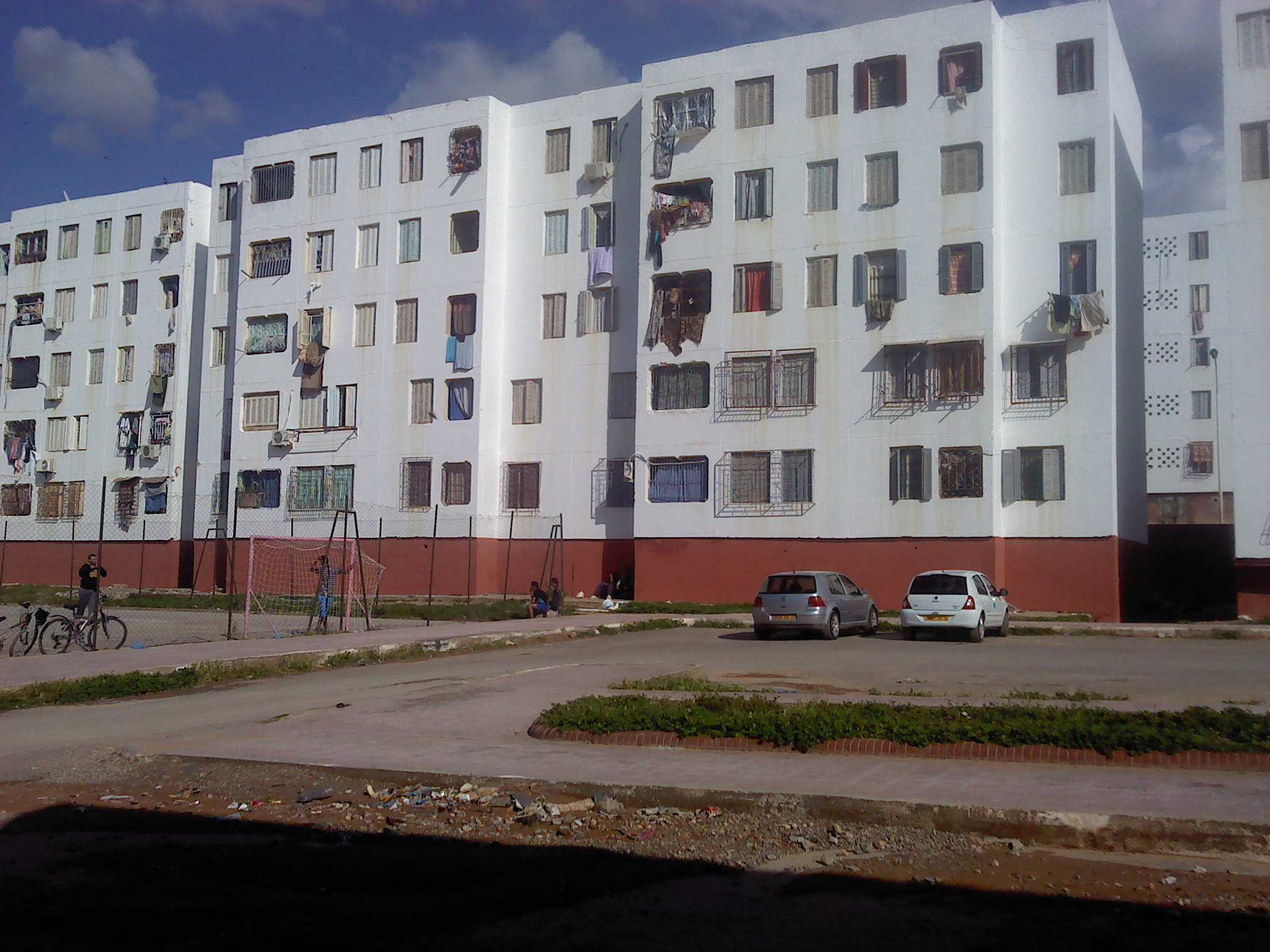 حي 500 سكن